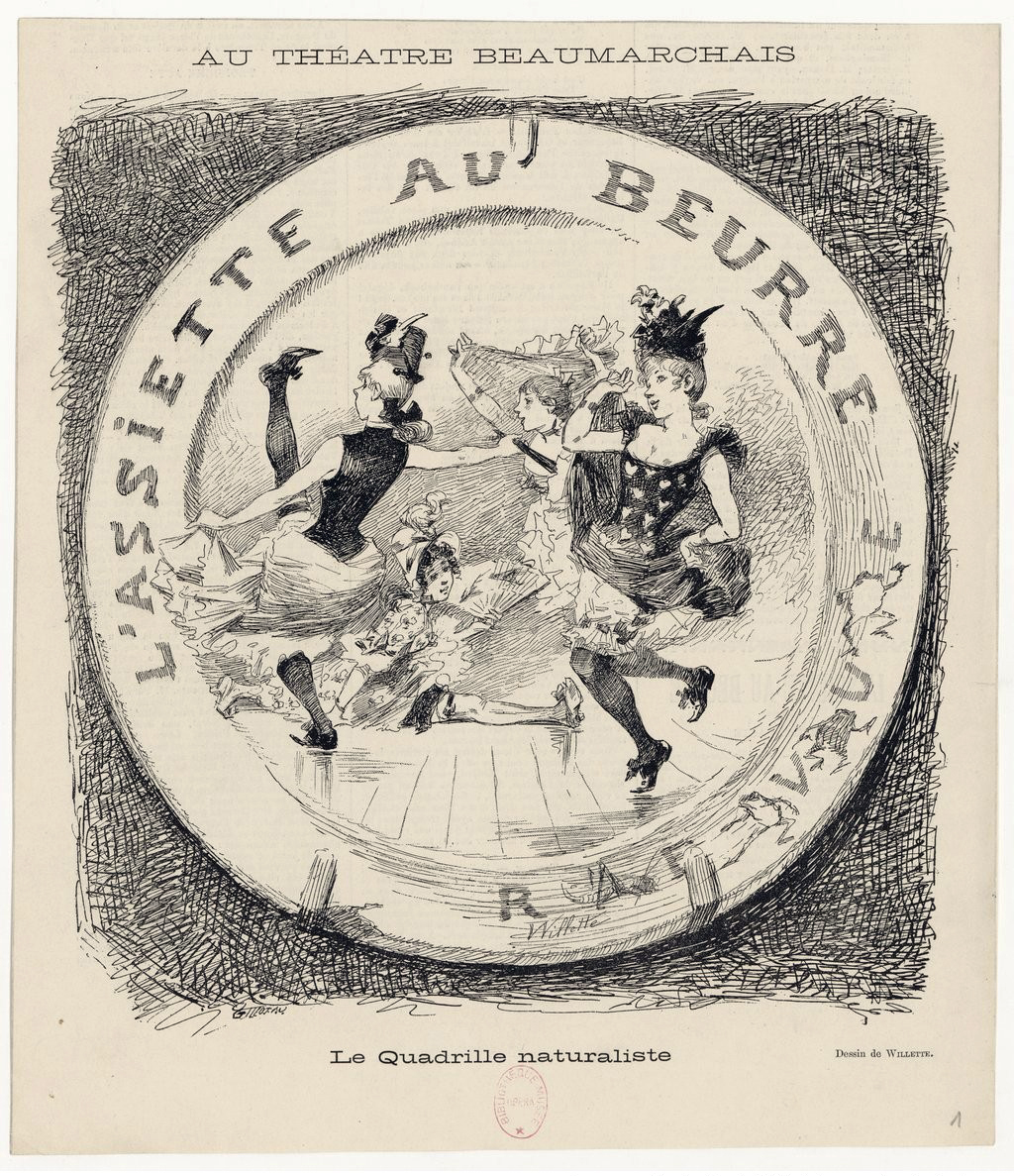 Estampe